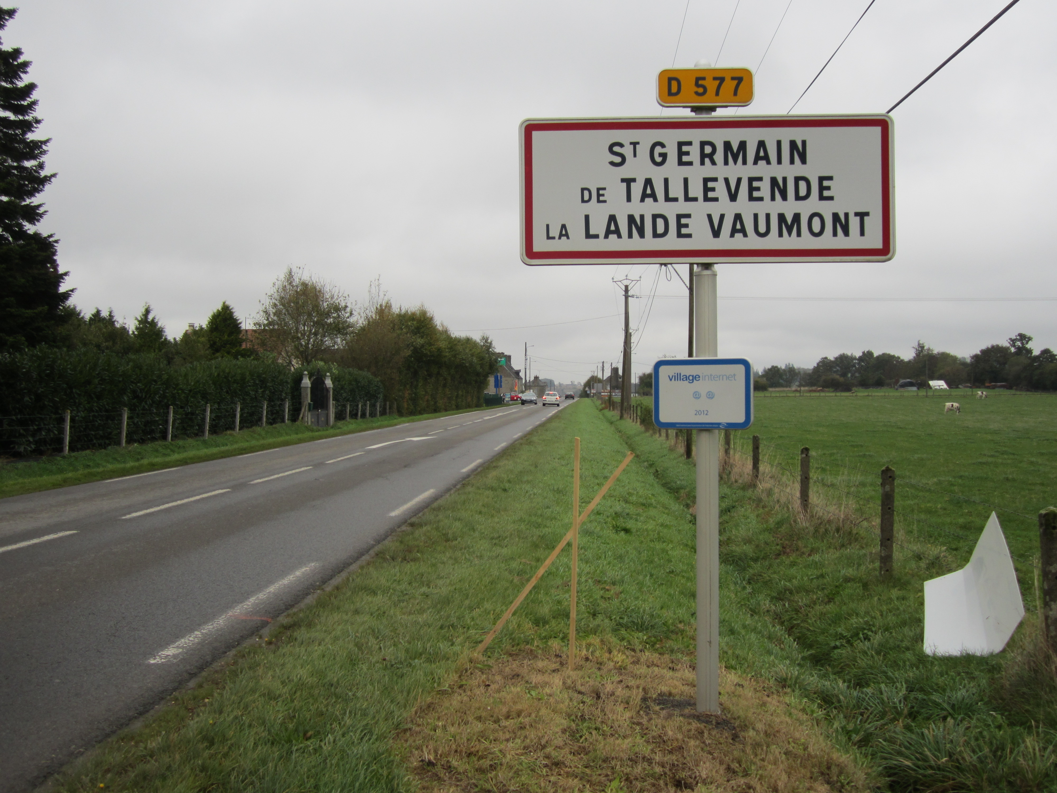 Panneau indicateur de l'entrée de la ville